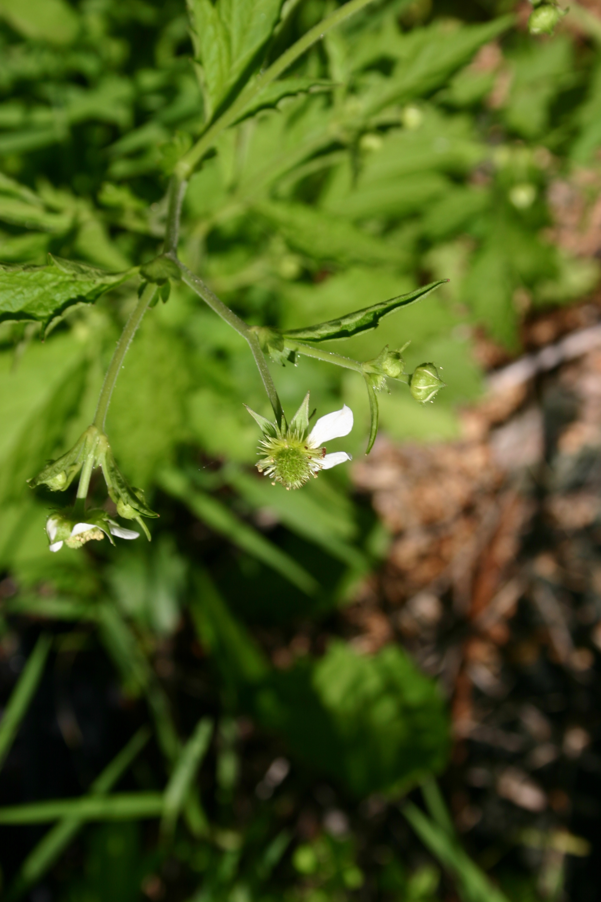 Geum canadense